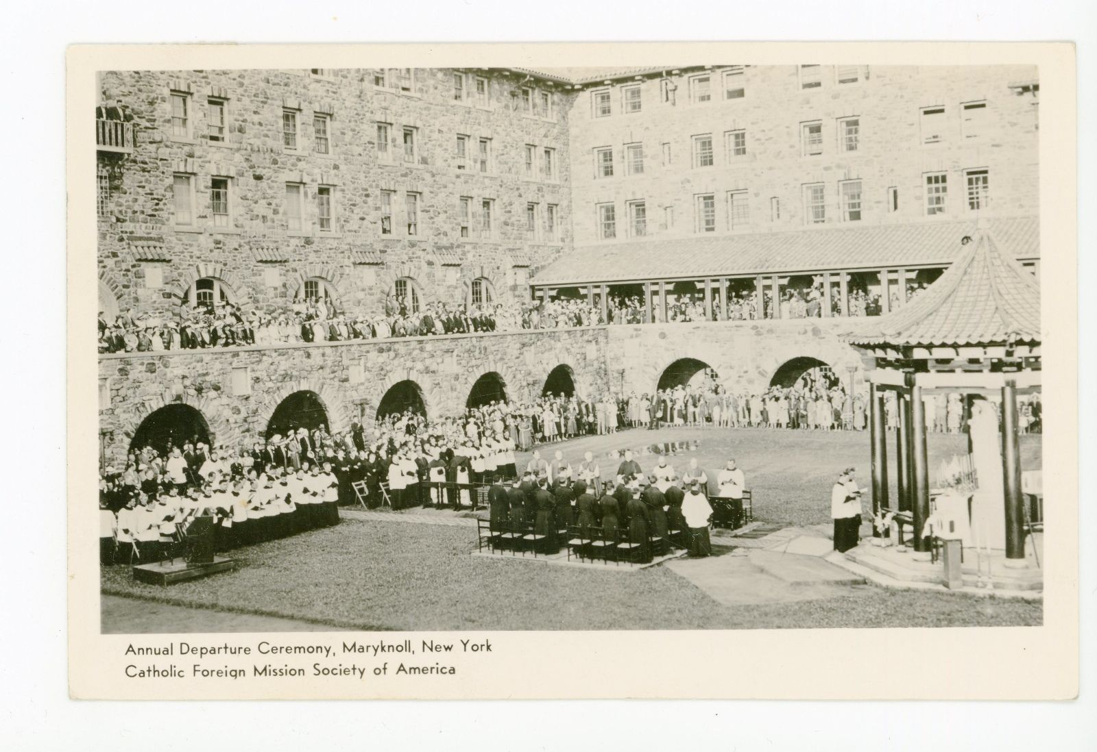 Cérémonie annuelle de départ des jeunes missionnaires de Maryknoll. 1942.